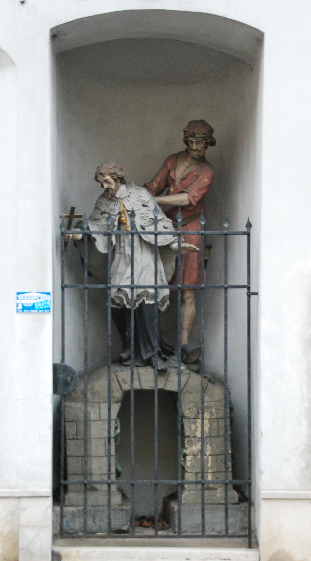 Johannes-Nepomuk-Statue (polychrom) in der Hochstraße 25 in Perchtoldsdorf in Niederösterreich